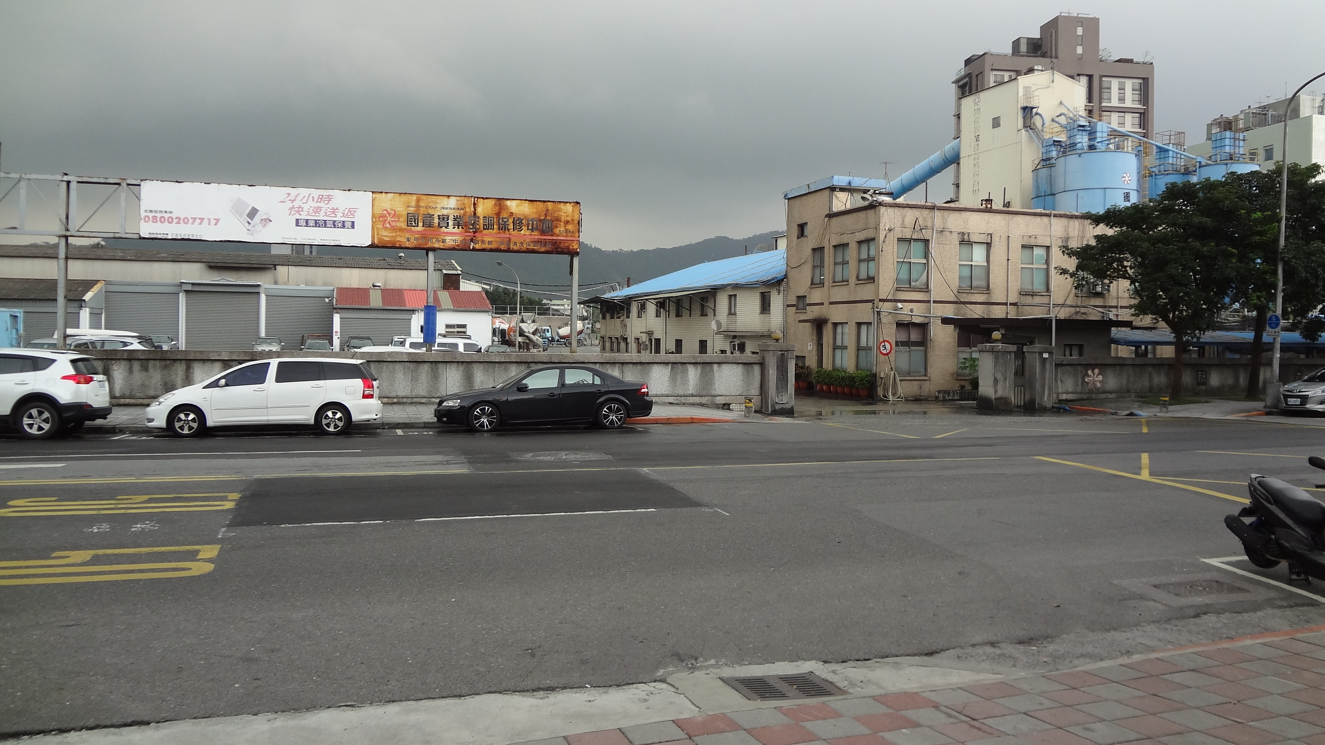 國產建材實業台北廠，位於臺北市南港區南港路三段33號。